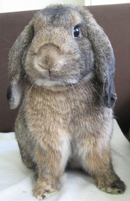 Deutscher Klein-Widder in wildgrau